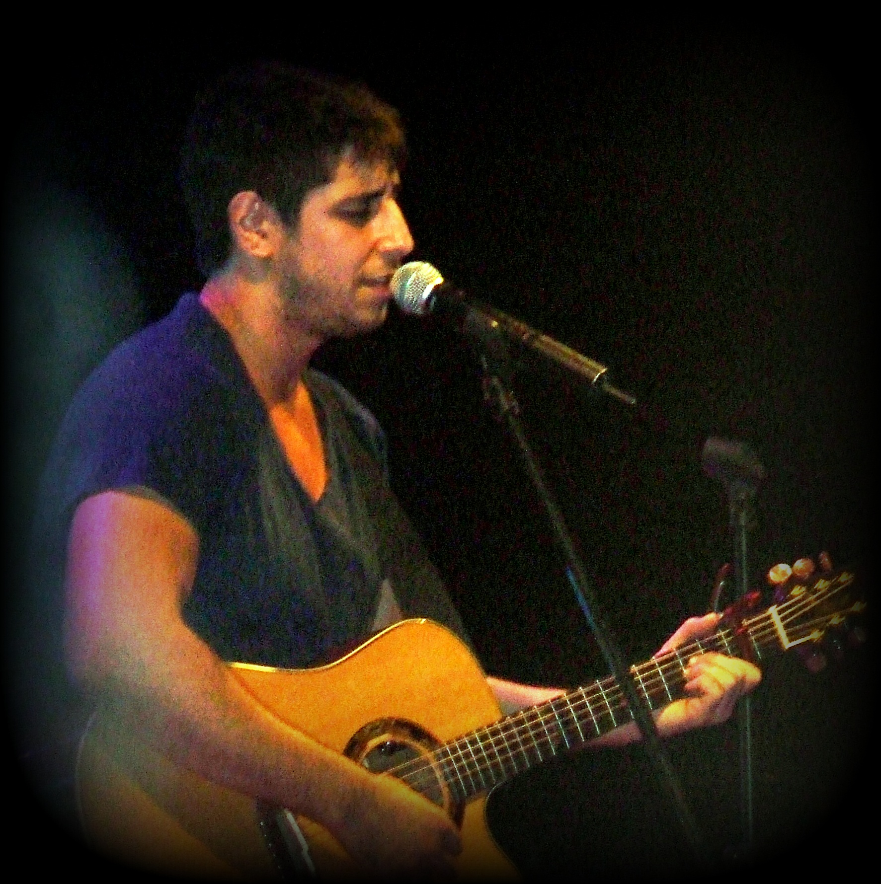 עידן עמדי בהופעה בעפולה